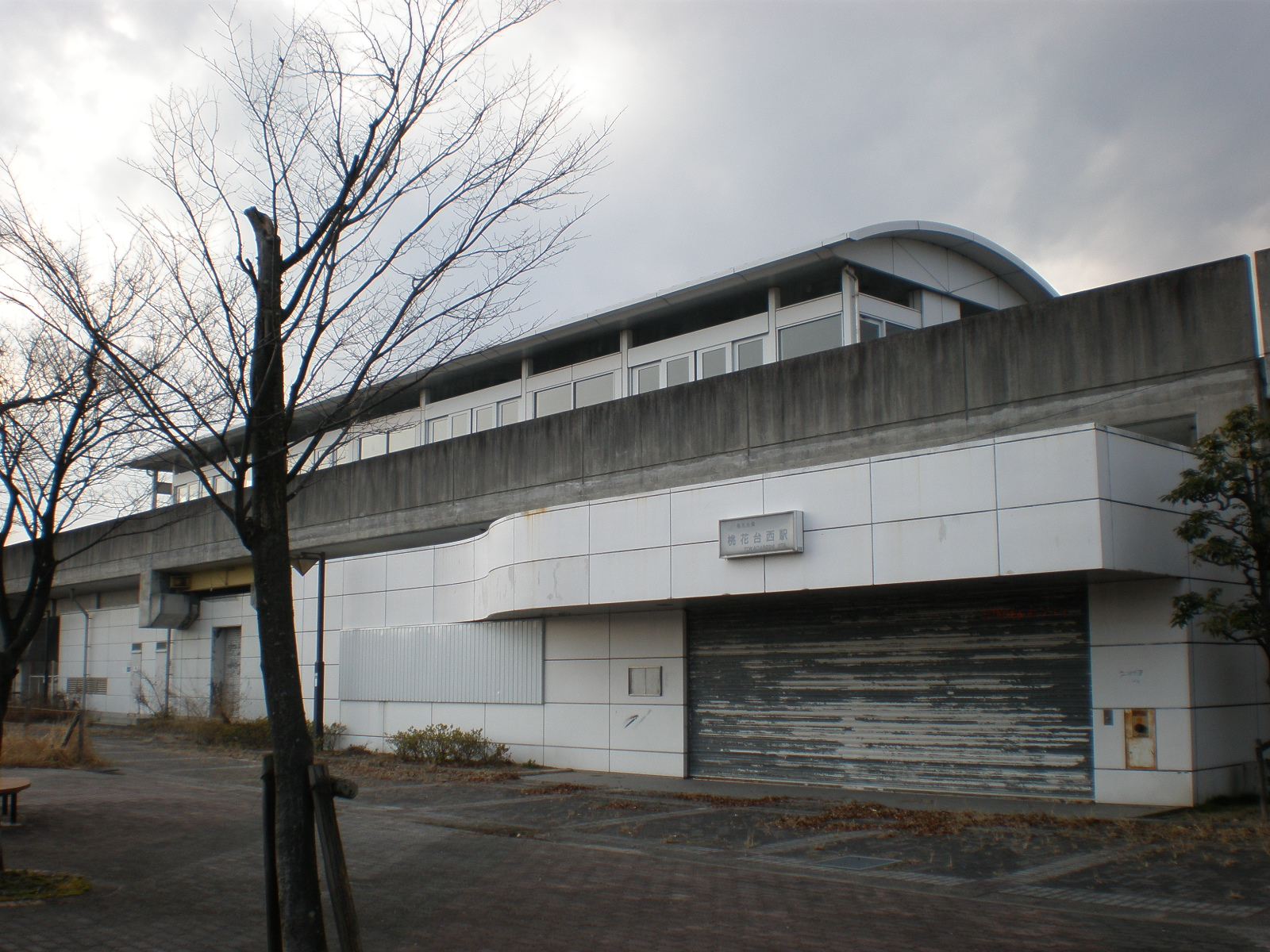 愛知県小牧市にある桃花台新交通桃花台線の桃花台西駅の廃止後を撮影した。